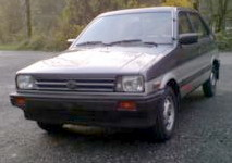 Bild von Subaru Justy